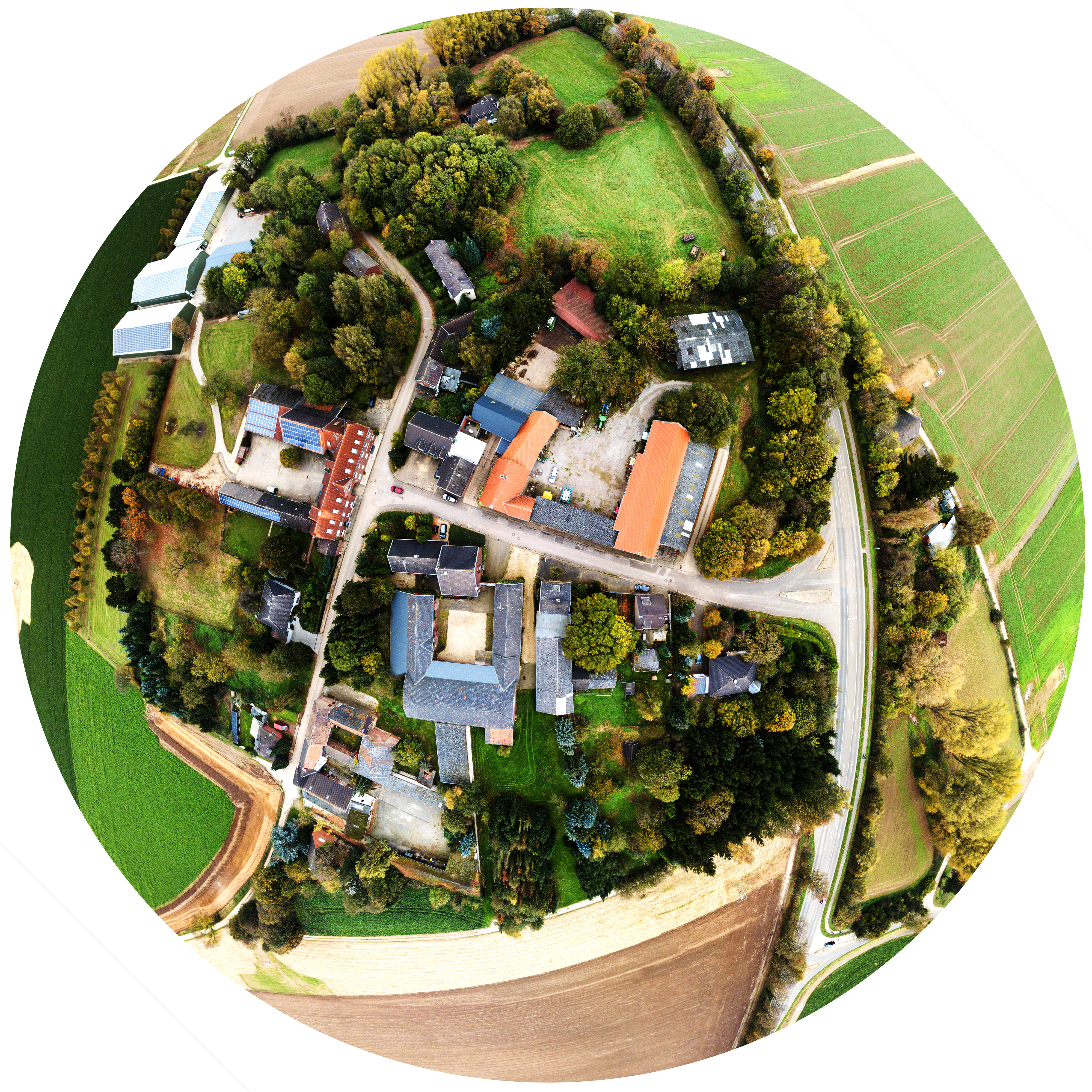 Lützerath ist ein Dorf in Nordrhein-Westfalen, welches im 12. Jh. gegründet wurde und im 21. Jh. den Baggern des Garzweiler Braunkohletagebaus weichen muss. Von dem Weiler wird vermutlich 2020 nichts mehr zu sehen sein. Die Aufnahme entstand mit einer Fotodrohne als Kugelpanorama. Das heißt, um den ganzen Ort in einem Bild zu erfassen, wurden ca. 20 Aufnahmen gemacht und zusammengerechnet. Daher die Verzerrung. Die Ausrichtung des Fotos gibt in etwa Nord/Süd-Richtung vor.